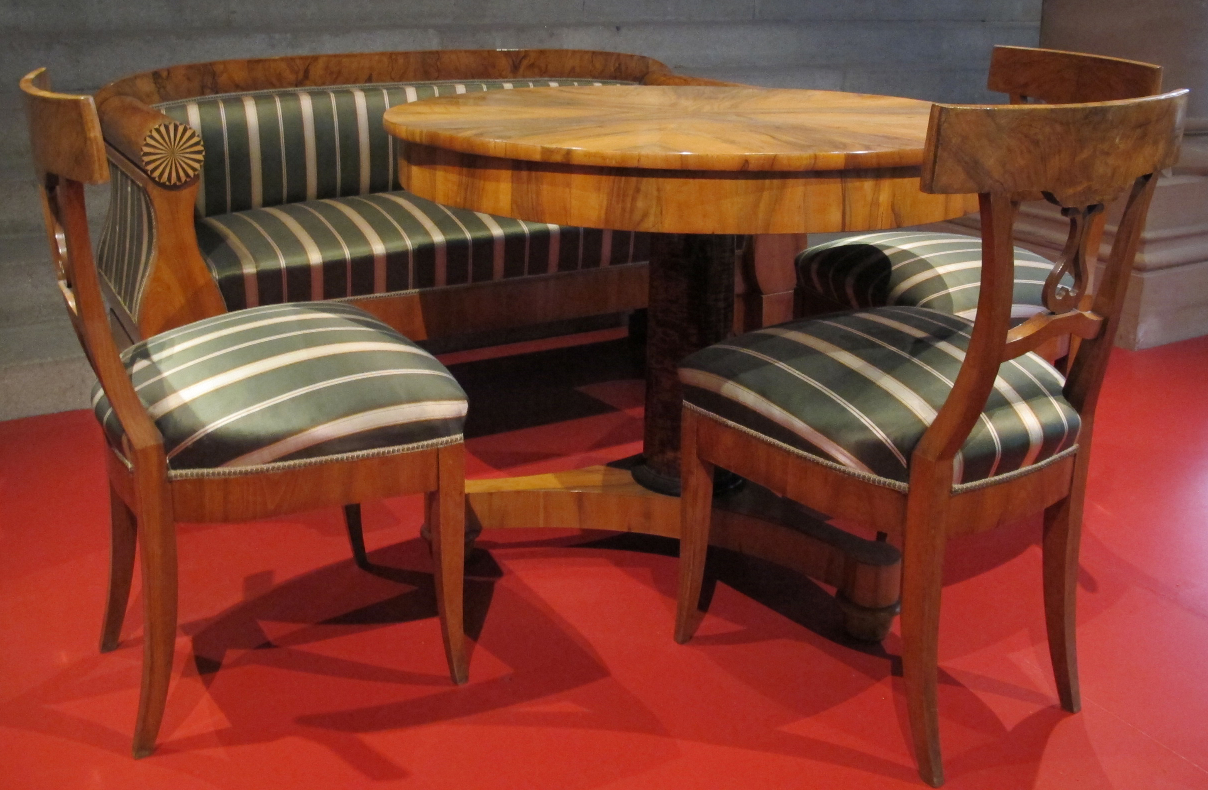 Gruppo di mobili biedermeier, 1820 circa